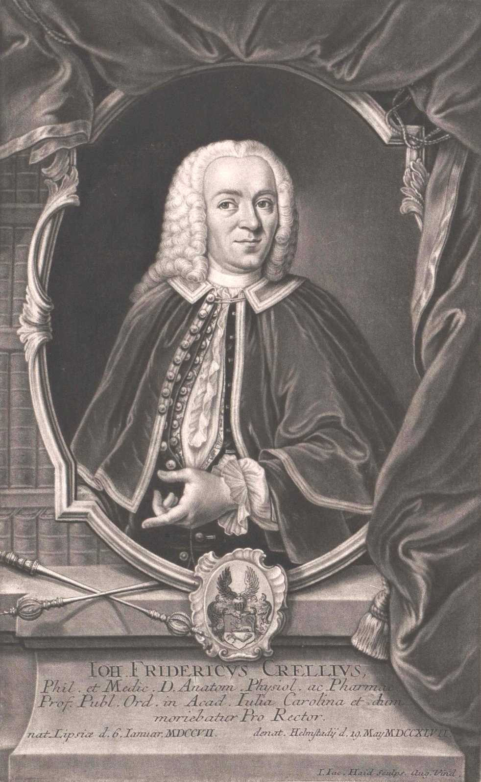 Johann Friedrich Crell (1707-1747), Kupferstich / copper engraving 1747